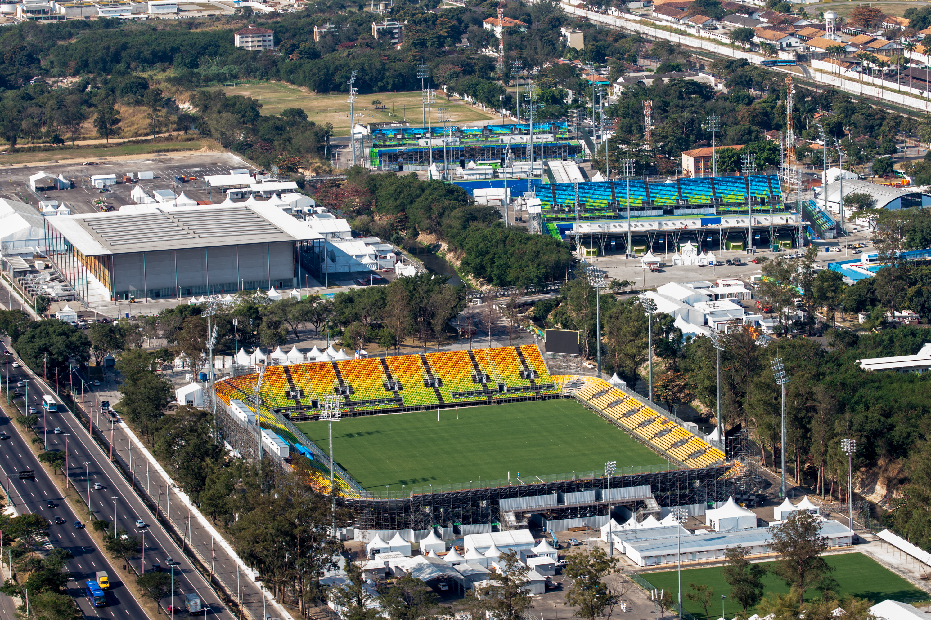 Visão geral do Parque Olímpico de Deodoro, com o Estádio de Deodoro (palco do rúgbi), o Centro Nacional de Hóquei sobre Grama (D) e a Arena da Juventude.